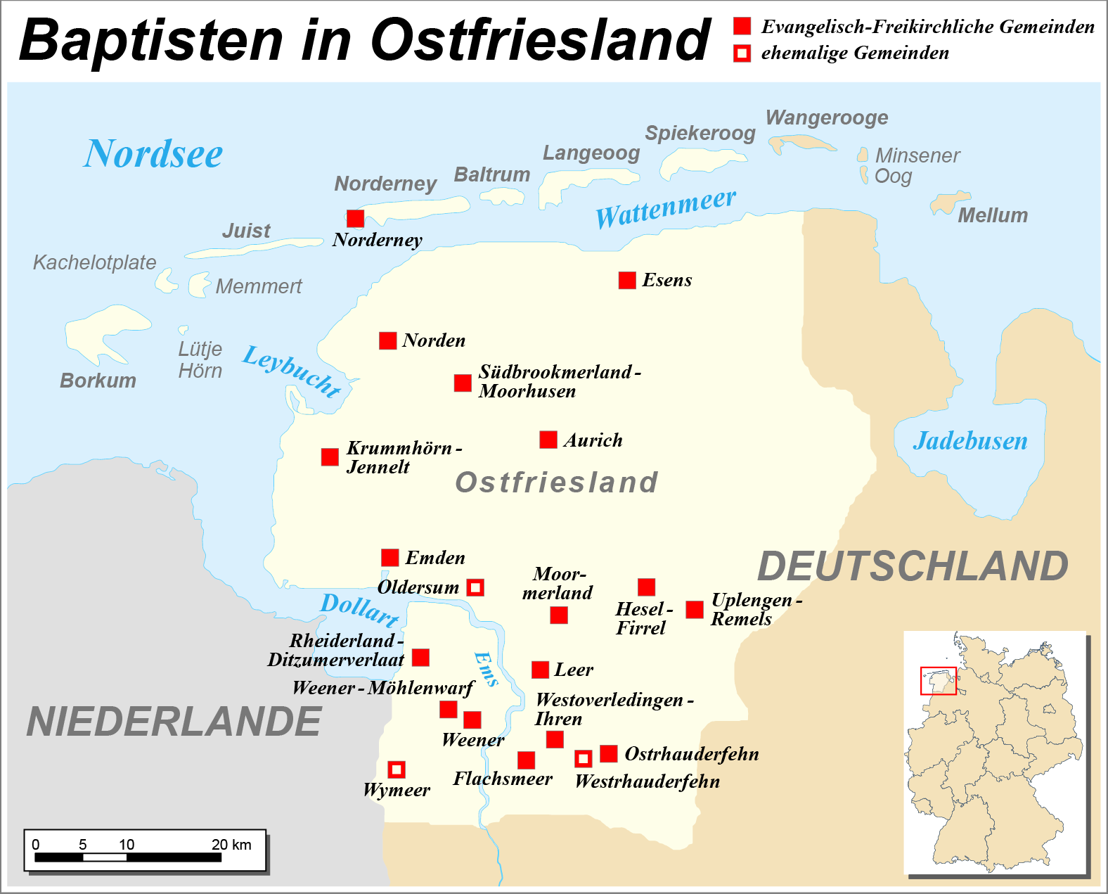 Karte der Baptisten in Ostfiriesland